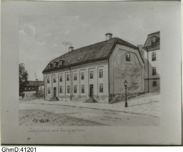 Garnisonssjukhuset i Göteborg, akvarell av Einar Hillberg (1885–1959), GSM. Sjukhuset var ett militärt sjukhus för Kungliga Göta artilleriregemente vid nuvarande Kungsgatan 10 i Göteborg, 1755-1895. Byggnaden revs 1907.